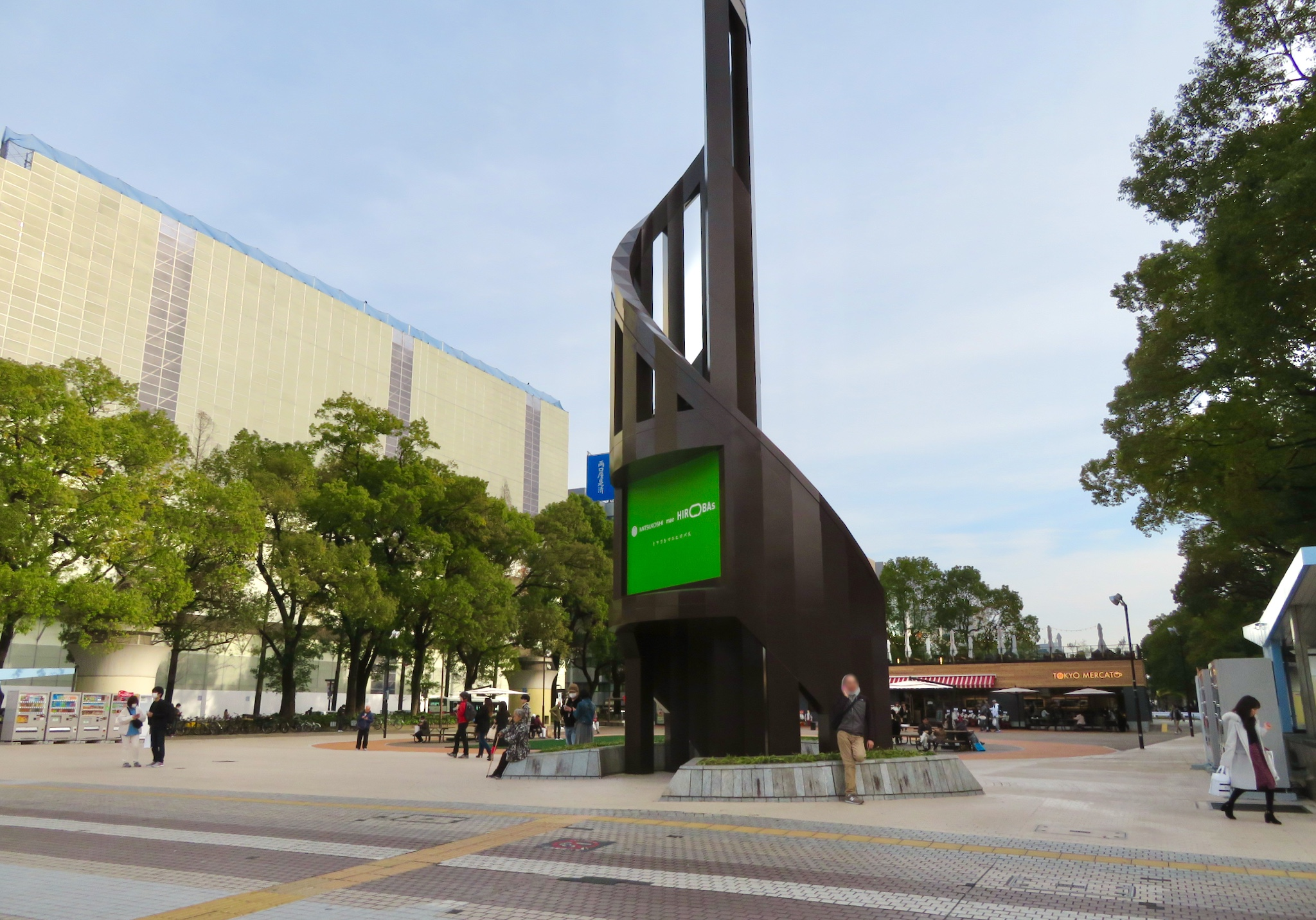 名古屋市中区栄の栄バスターミナル跡地に整備された「ミツコシマエヒロバス」。